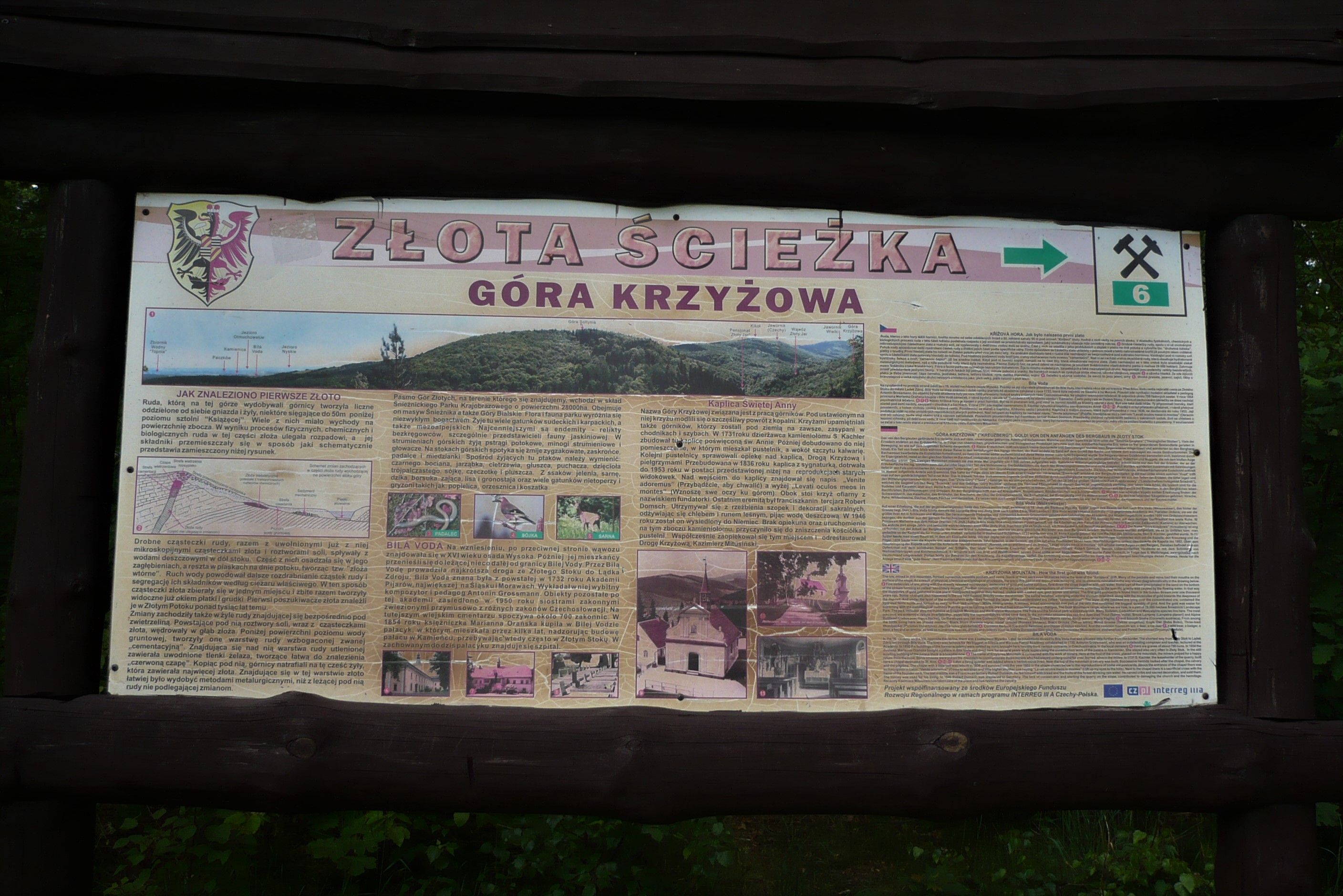 Złoty Stok